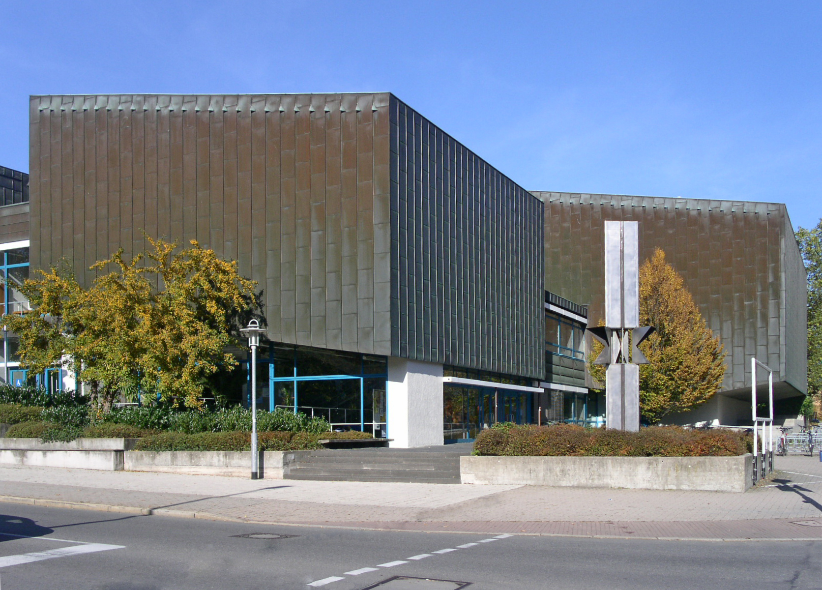 Stahlplastik: Hans Uhlmann, 1971, vor dem „Kupferbau“ der Universität Tübingen in der Hölderlinstraße Ecke Gmelinstraße. Blick von der Gmelinstraße